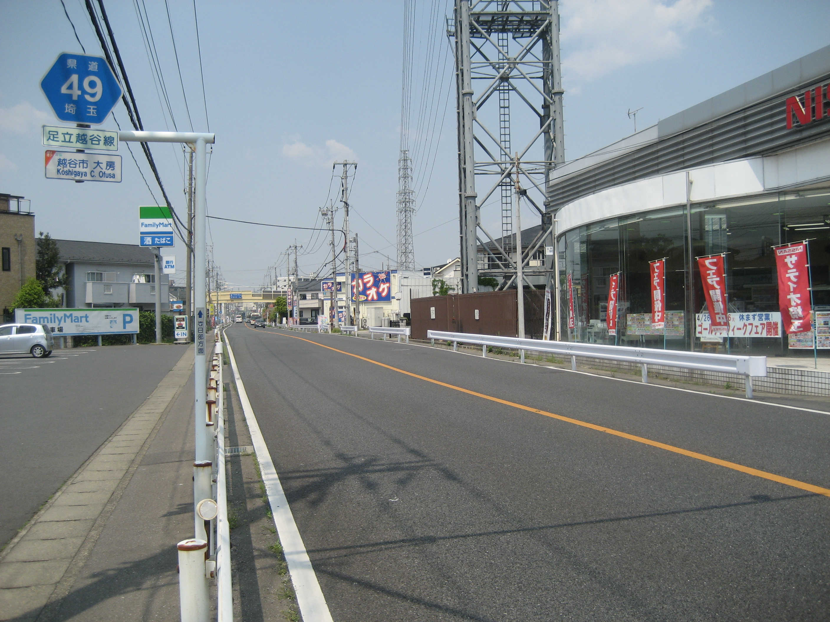 埼玉県道49号線越谷市大房付近（春日部方面を撮影）